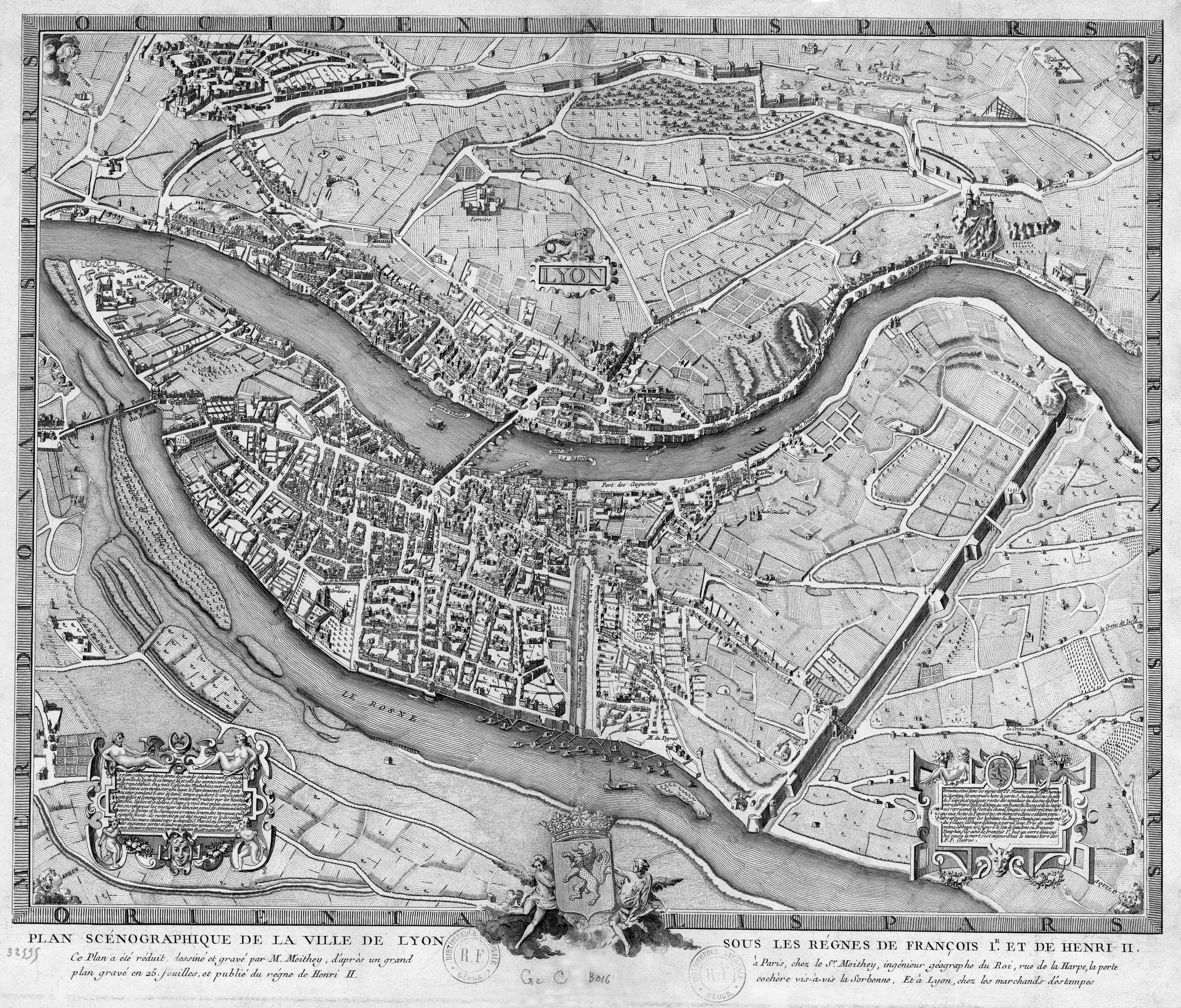 Plan scénographique de la ville de Lyon sous les règnes de François 1er et de Henri II.